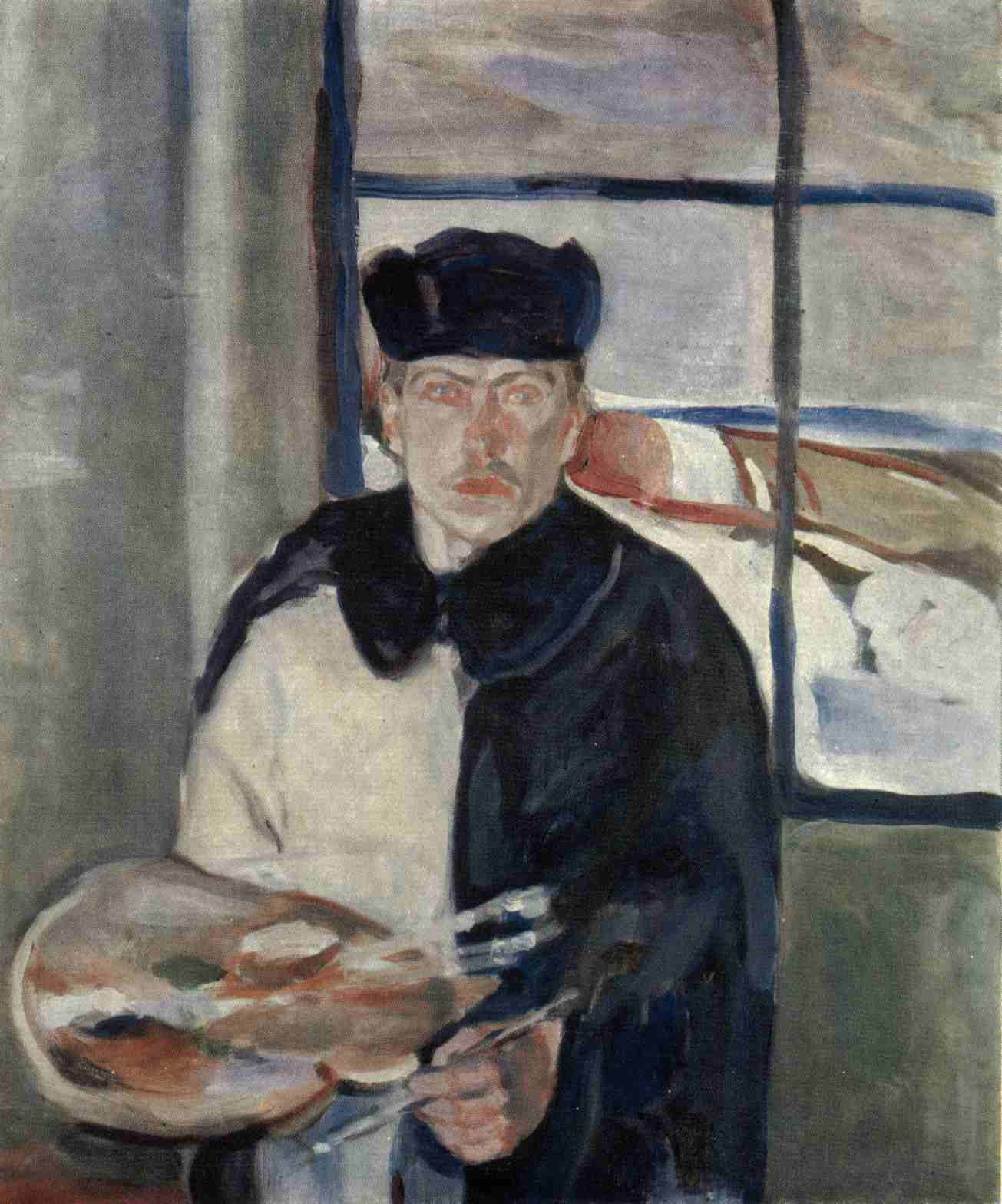 Vlastní podobizna v zimním šatě (1910-11)